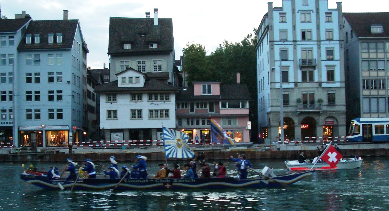 Hirsebreifahrt, Zurich, Switzerland self-made, August 2006